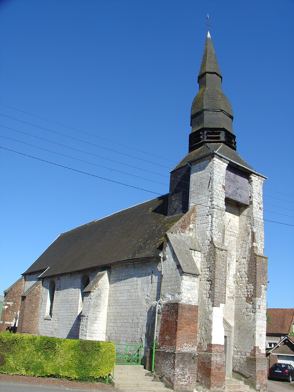 Église de Linzeux